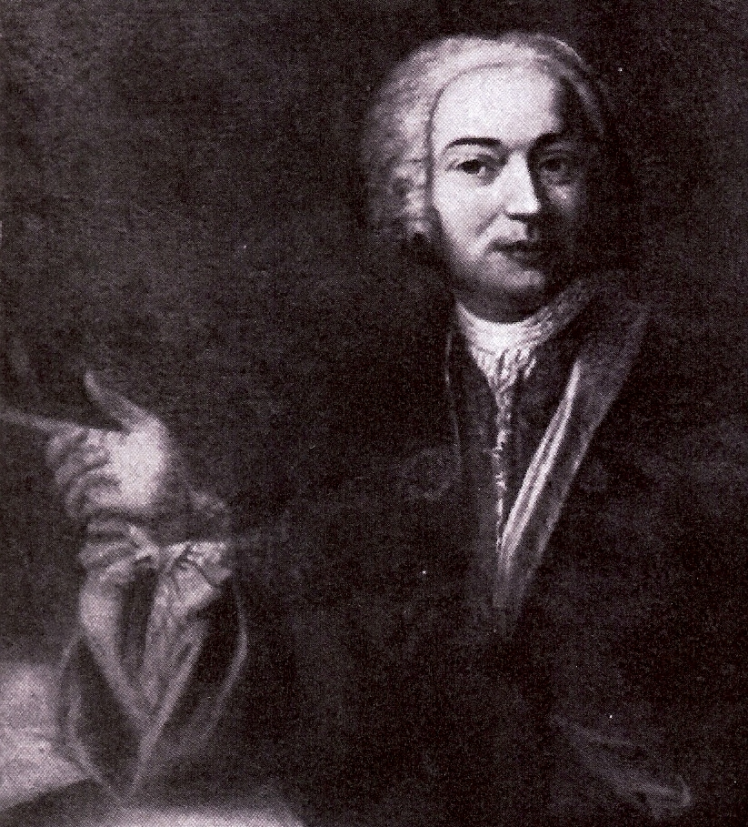 Christoph Dietrich von Keller, 1699-1788, Tübingen, Stedten